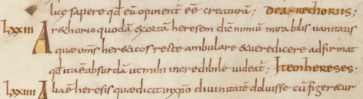 Августин в книге «De Haeresibus ad Quodvultdeum Liber Unus» («Ереси, попущением Бога, в одной книге») о риторинах. «Smaragdus». рукопись IX века.